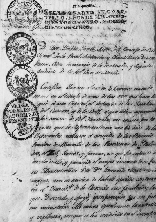 Documento de la corona española en 1800.